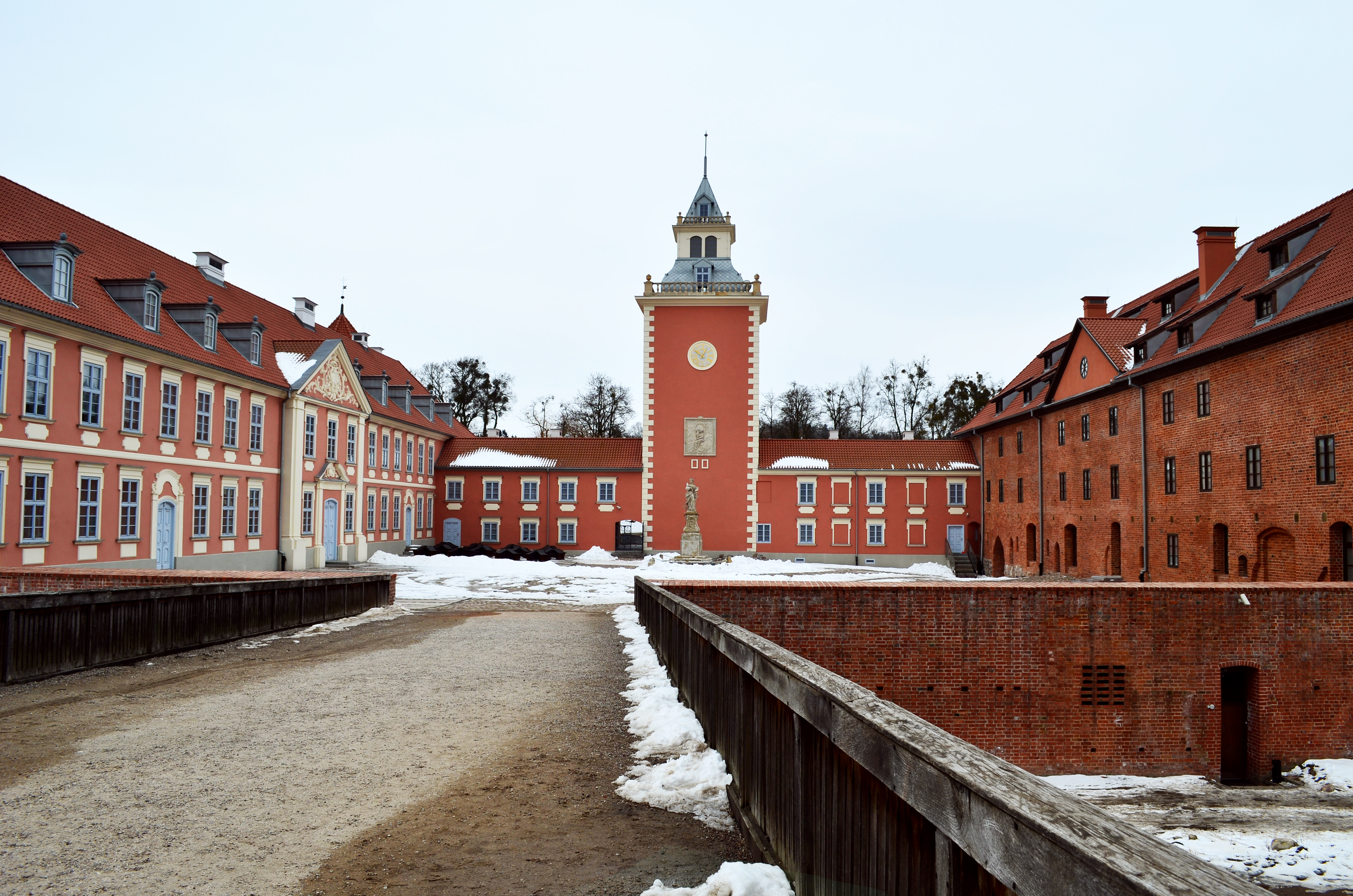 Lidzbark Warminsky